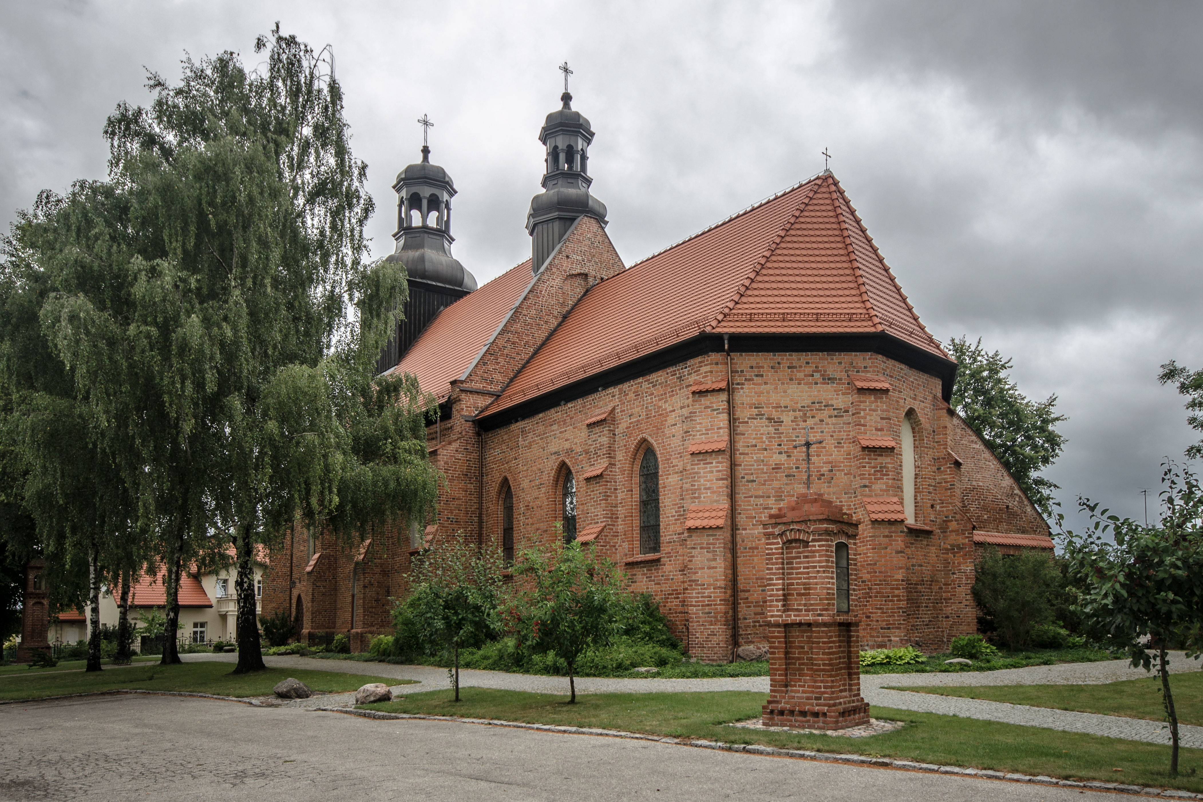 Gniewkowo, kościół par. p.w. śś. Mikołaja i Konstancji, XIV, 1871